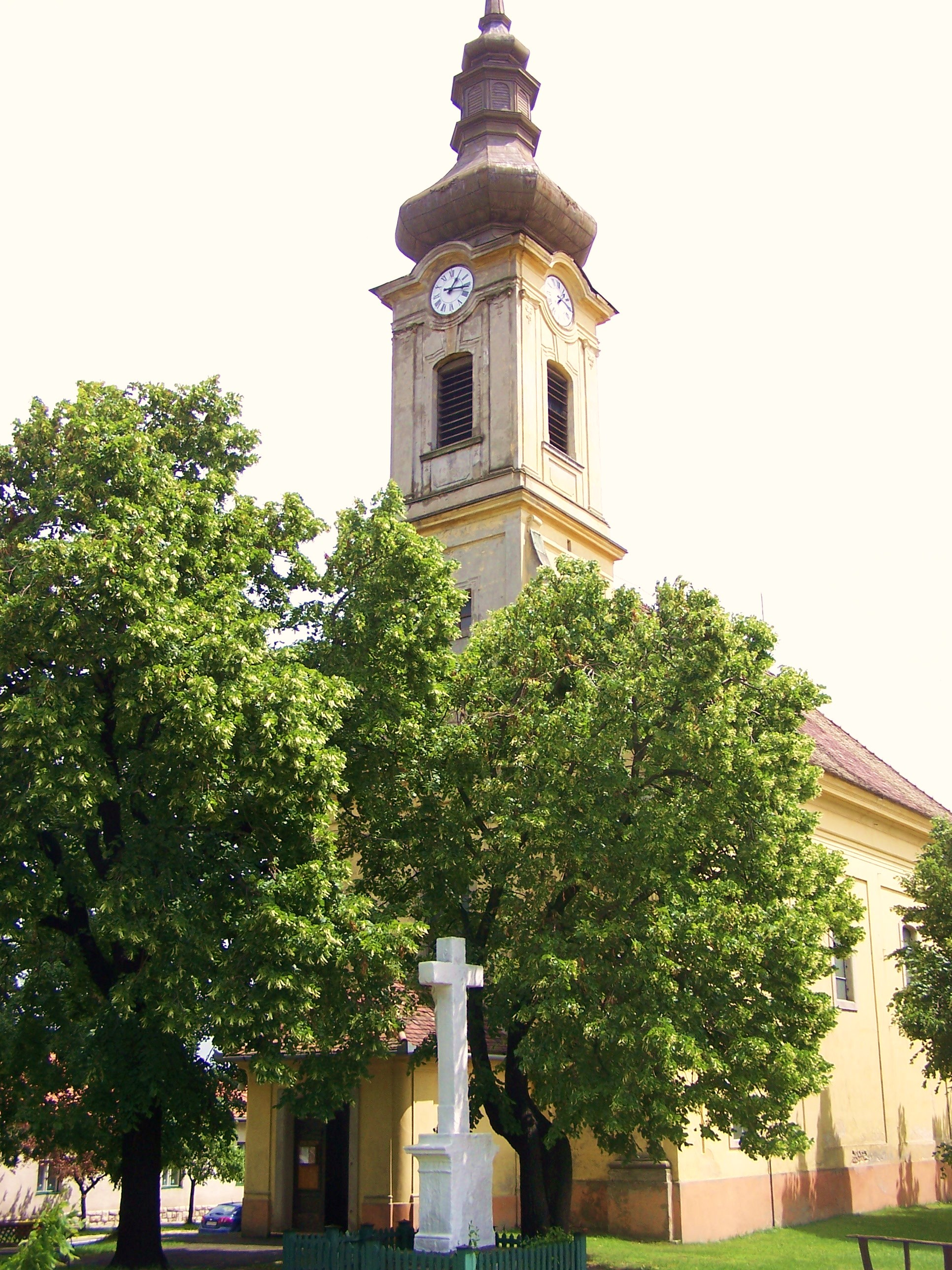 Keresztelő Szent János római katolikus templom (Szár, Rákóczi Ferenc utca)